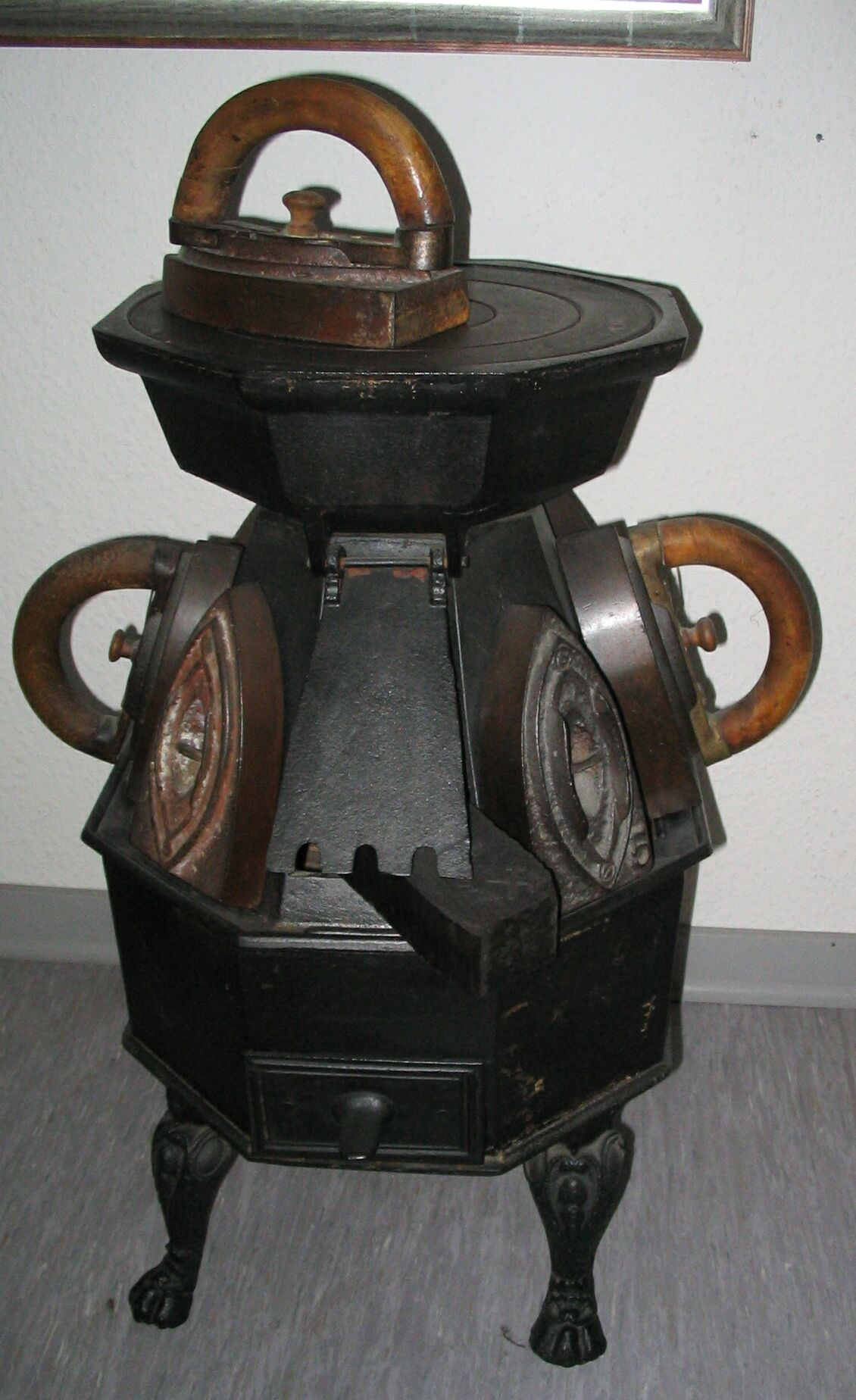 Flat-iron-stove. Bügeleisen-Ofen, Schneiderofen.. Das Bügeleisenöfchen ist mit Holz oder Kohle zu beheizen. Die Eisen sind nummeriert, um immer das jeweils heißeste Eisen herauszufinden. Die Griffe der Bügeleisen sind abnehmbar. Alter unbekannt.